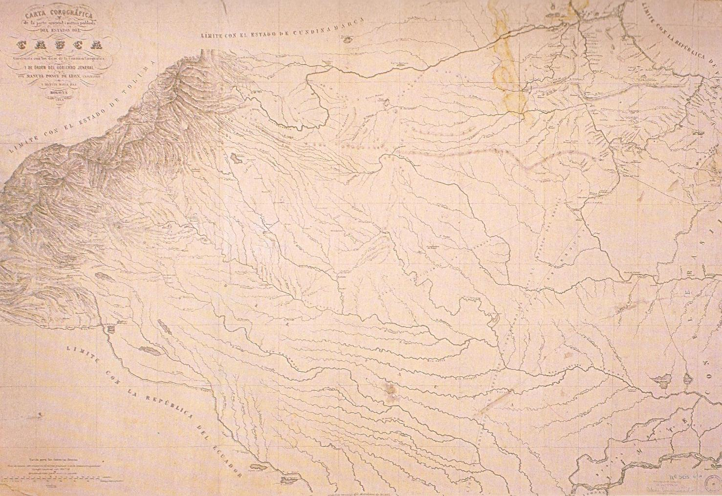 Carta Corográfica del Territorio del Caquetá. Tomado del "Atlas de los Estados Unidos de Colombia, antigua Nueva Granada", 1865.